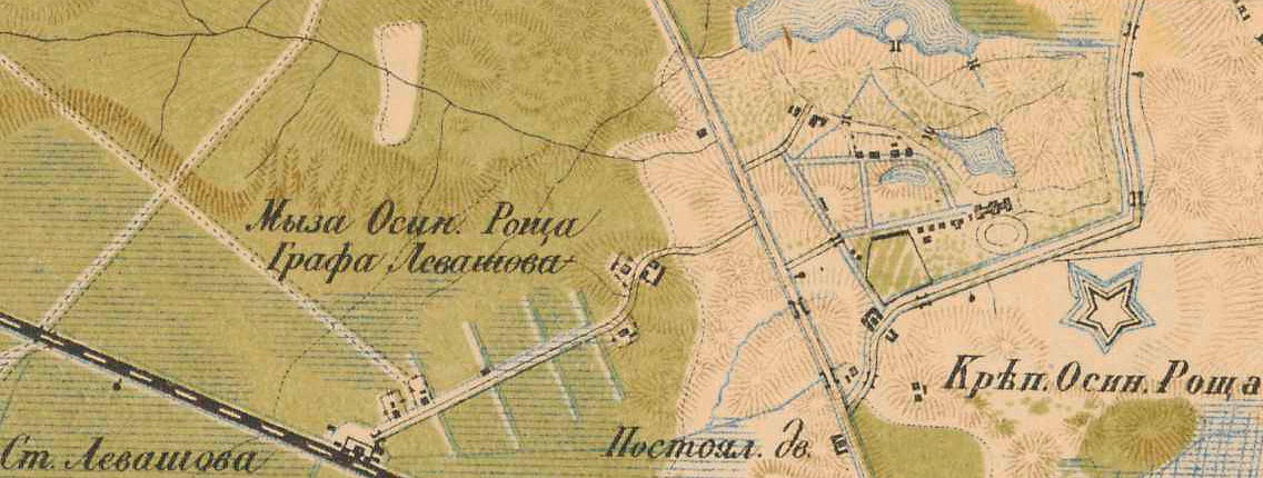 Осиновая Роща на карте 1885 года.